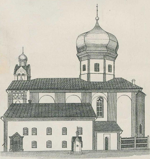 Беларуская (тарашкевіца): Віцебск (Viciebsk), Ніжні Замак (Nižni Zamak). Царква Зьвеставаньня па маскоўскай перабудове